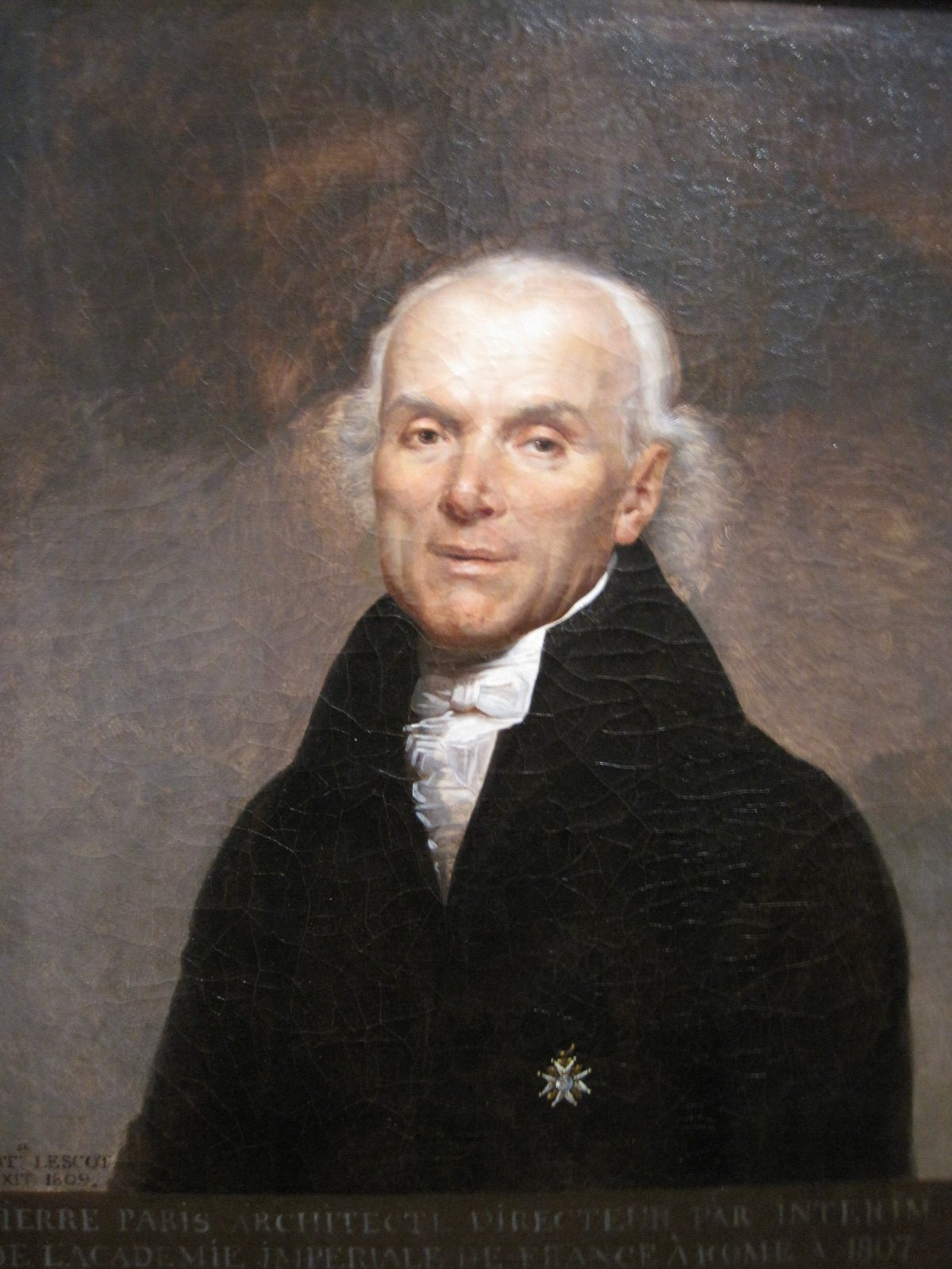 Portrait de Pierre-Adrien Pâris - Musée des Beaux-Arts de Besançon